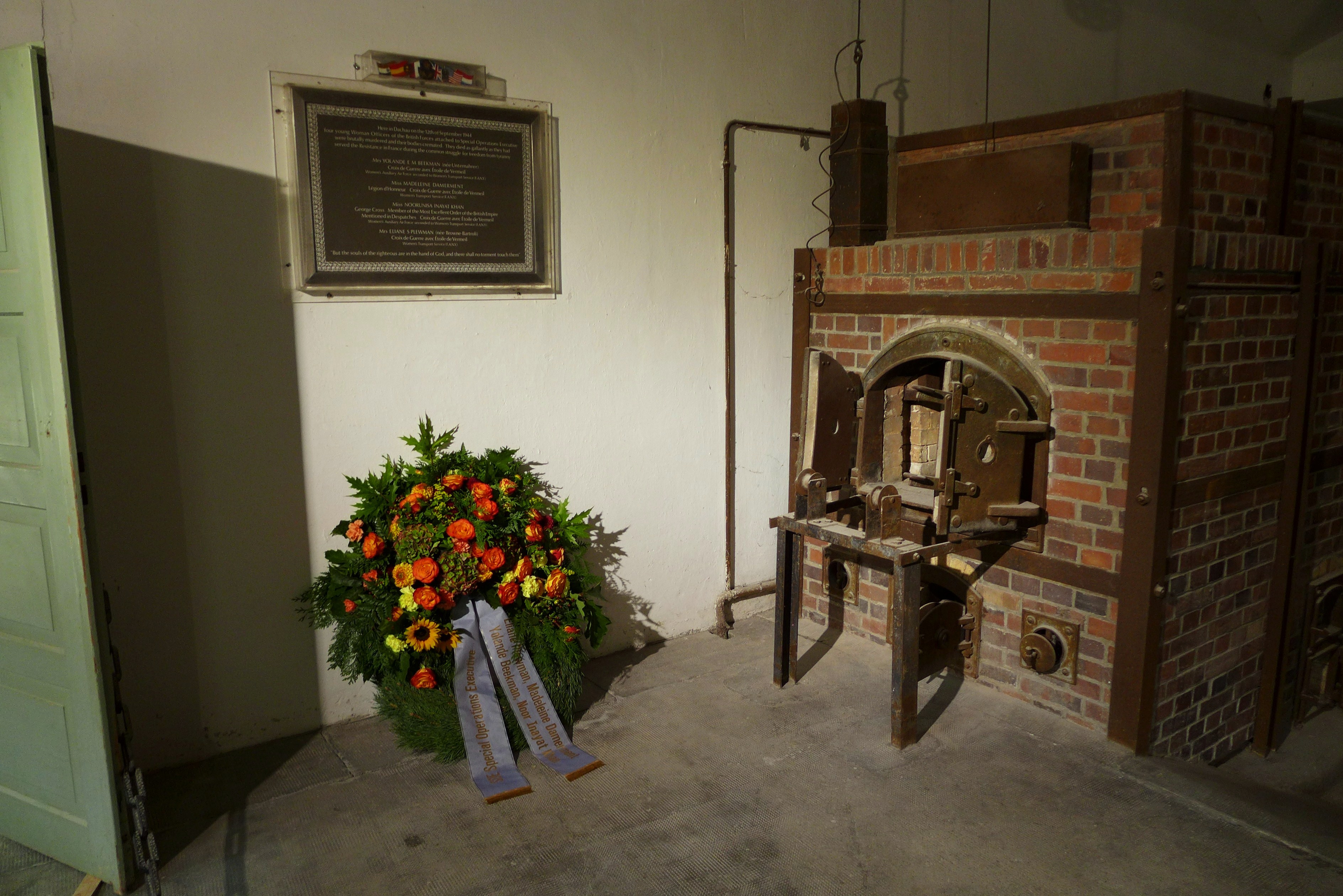 Dachau Germany Deutschland, KZ Dachau Krematorium SOE Yolande Beekman, Madeleine Damerment, Noor-un-Nisa Inayat Khan, Eliane Plewman